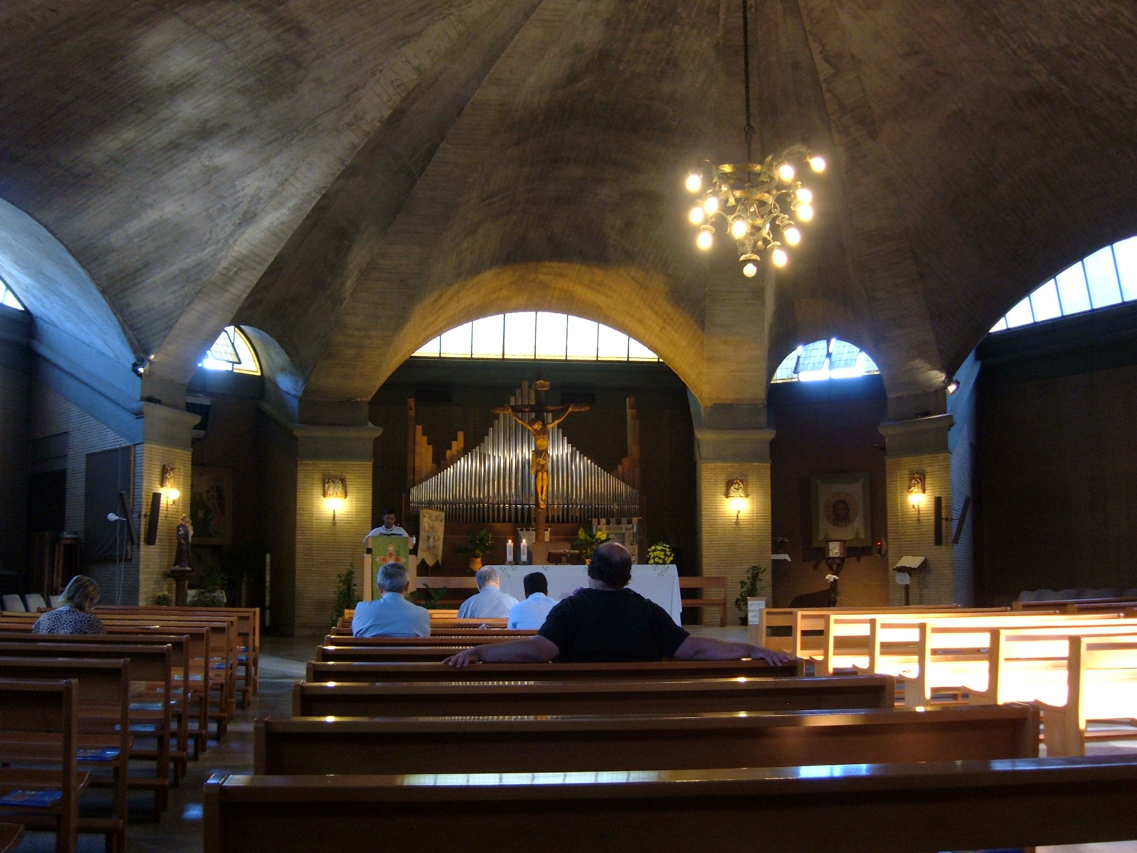 Chiesa dell'Assunzione di Maria, a Roma, nel quartiere Tuscolano. Interno.